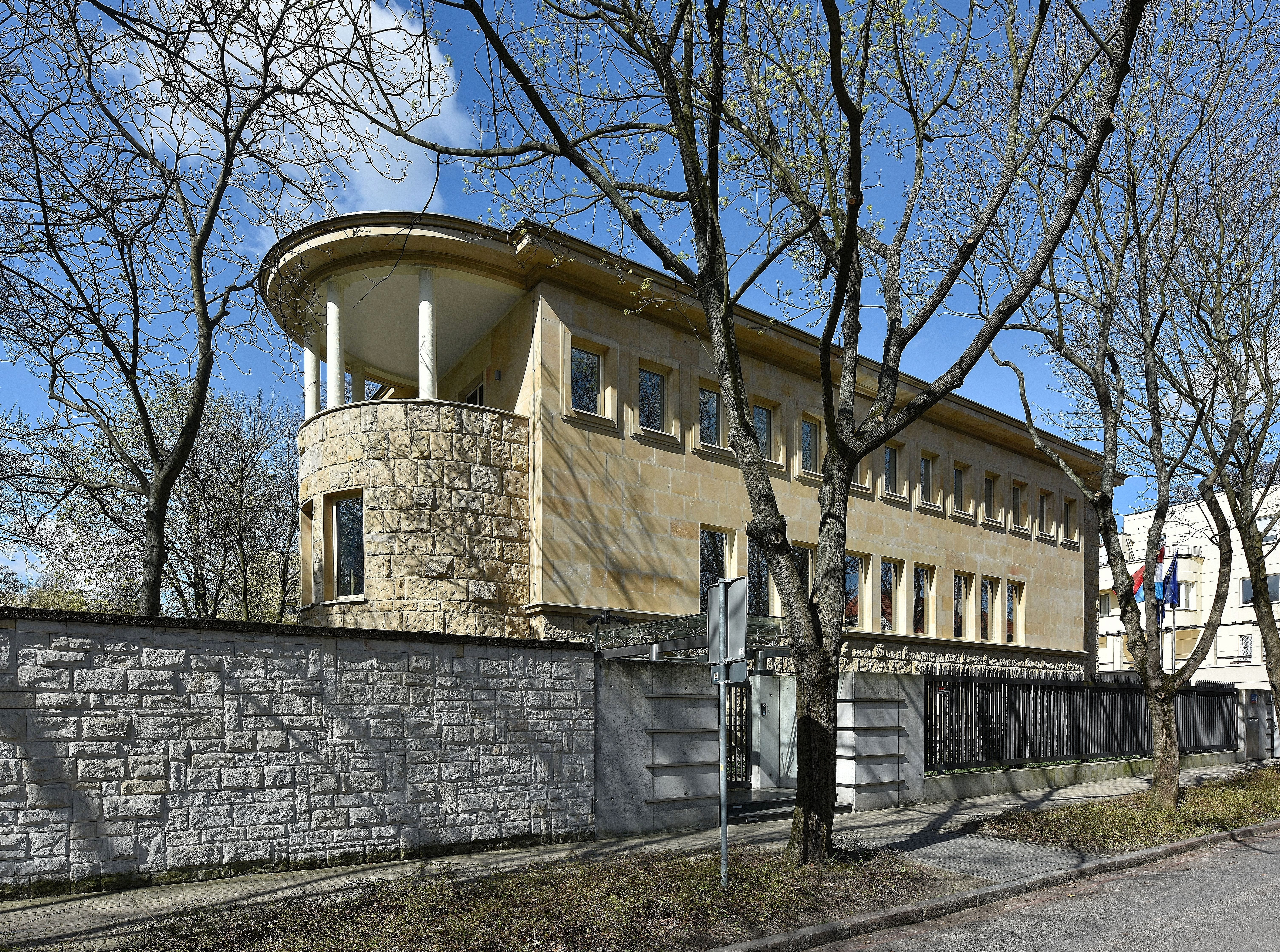 Ambasada Luksemburga przy ul. Słonecznej 15 w Warszawie (proj. L. Korngold)